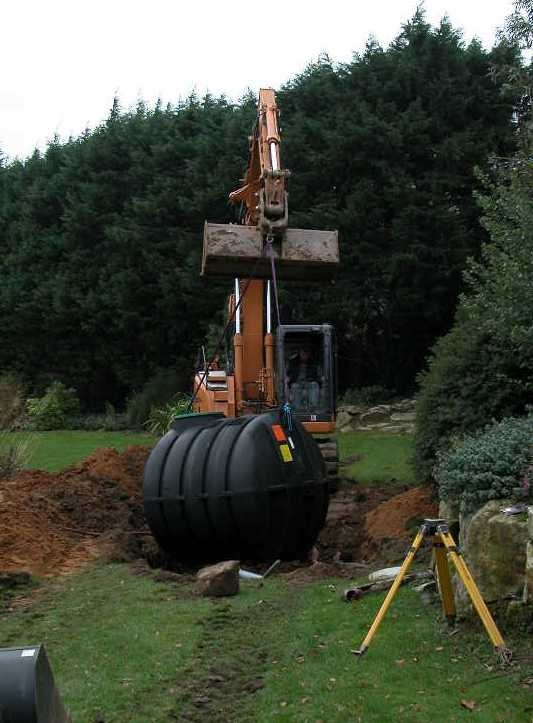 Photo de la pose d'une fosse toutes eaux PE